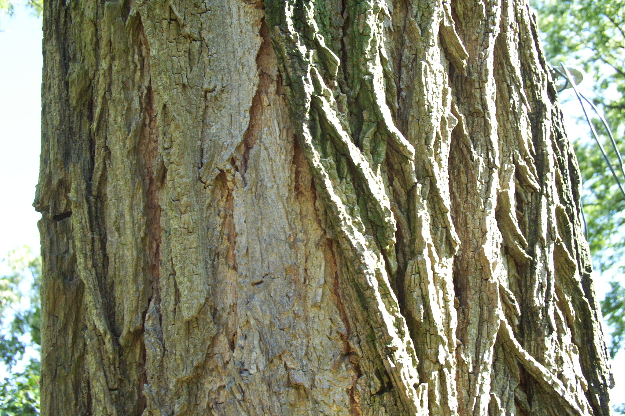 Robinia pseudacacia (Cortex)